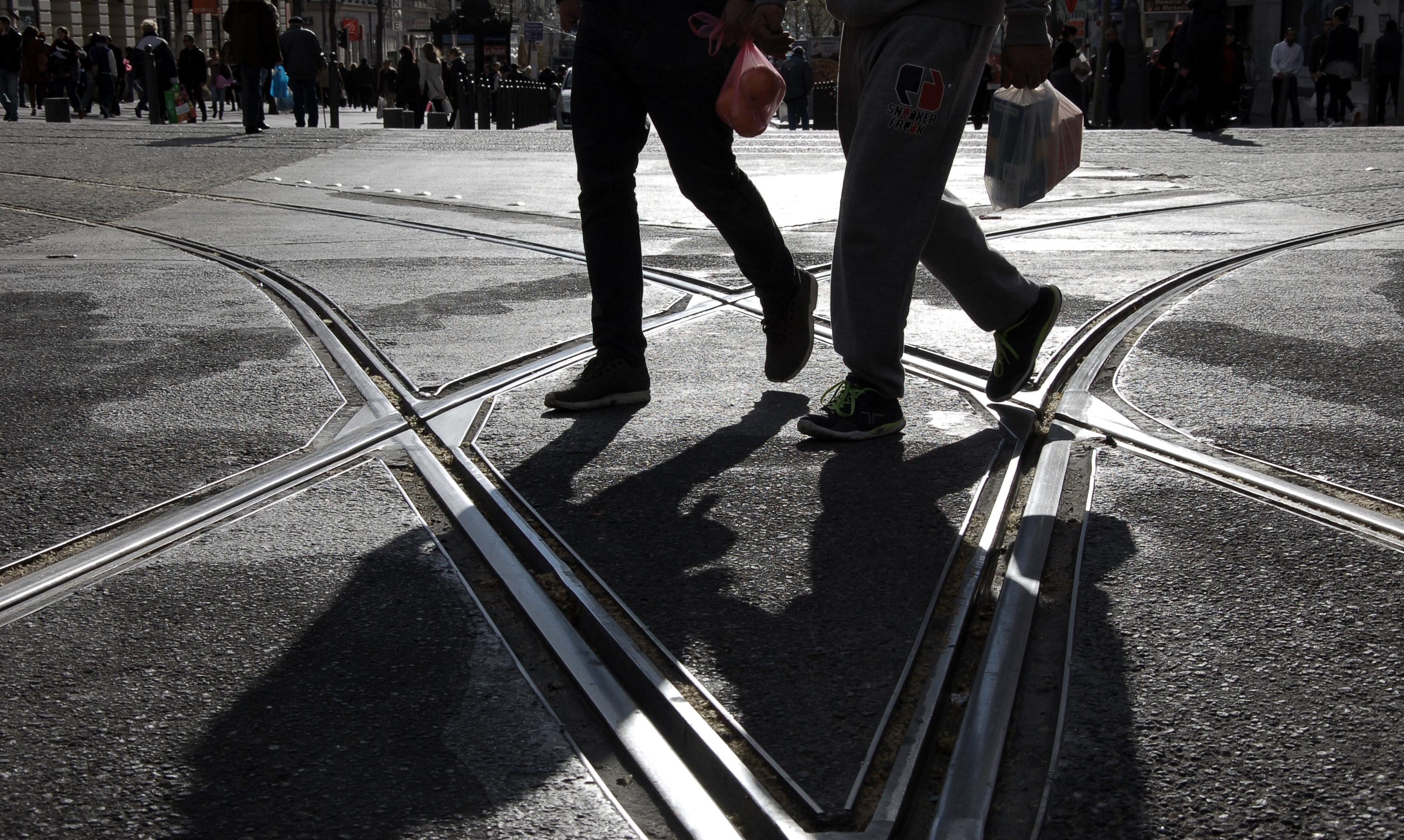 Vue de la Canebière, à l'angle des cours Saint-Louis et Belsunce: le fameux "point zéro"